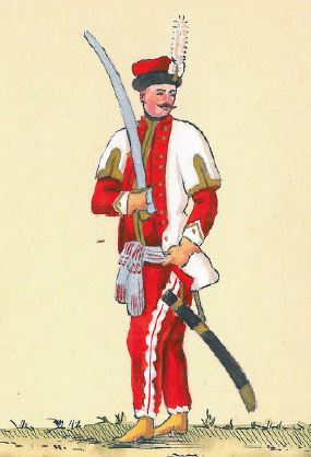 57. Brygadier Poniatowski szef 3 Pułku Ułanów (oficer pułku 3 SP buławy PK ( właściwie Ignacy poniatowski był komendantem pułku 5 PS)